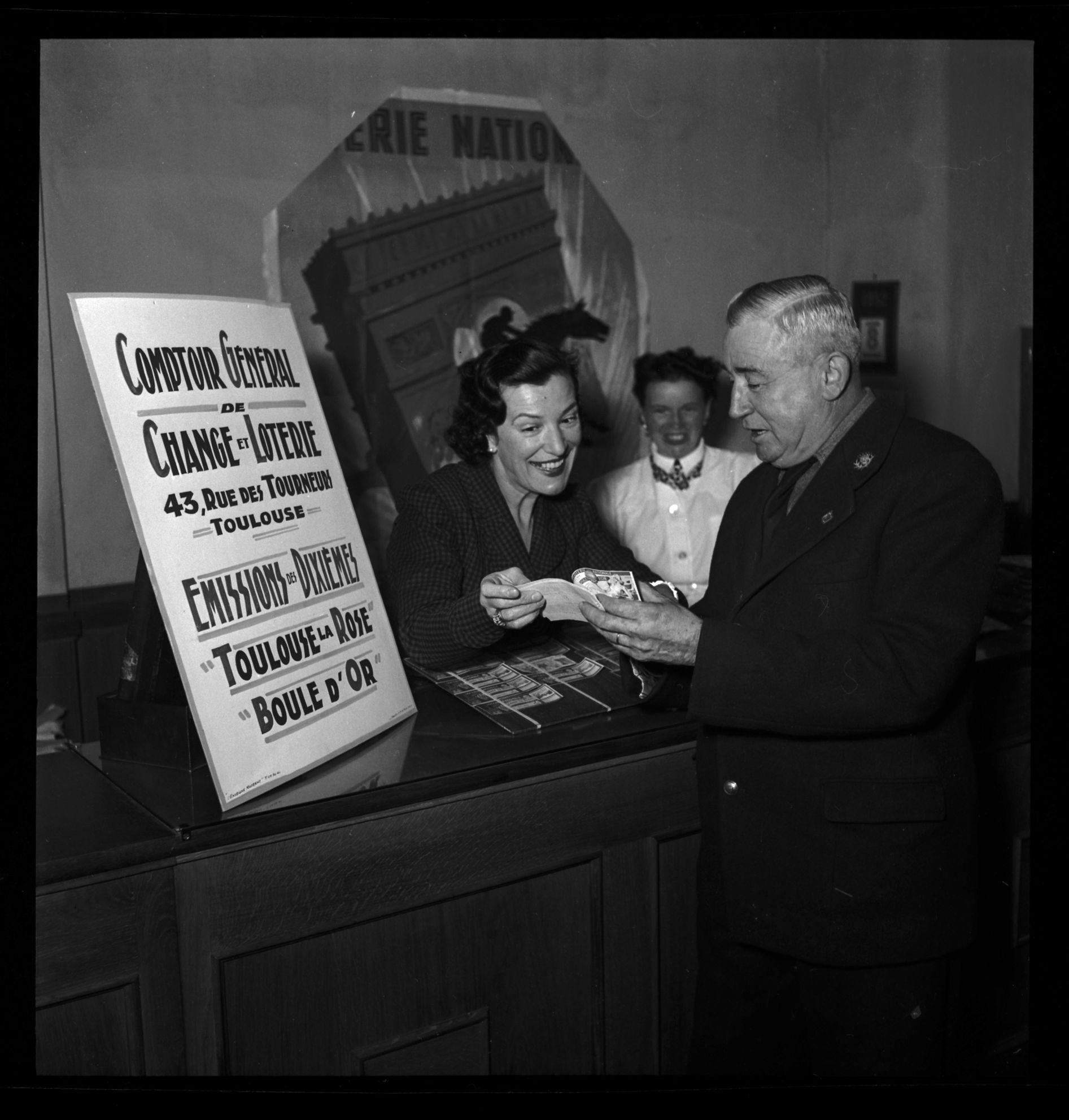 43 Rue des Tourneurs à Toulouse. 16 octobre 1952. Vue de Monsieur Escudier gagnant de la Loterie Nationale.